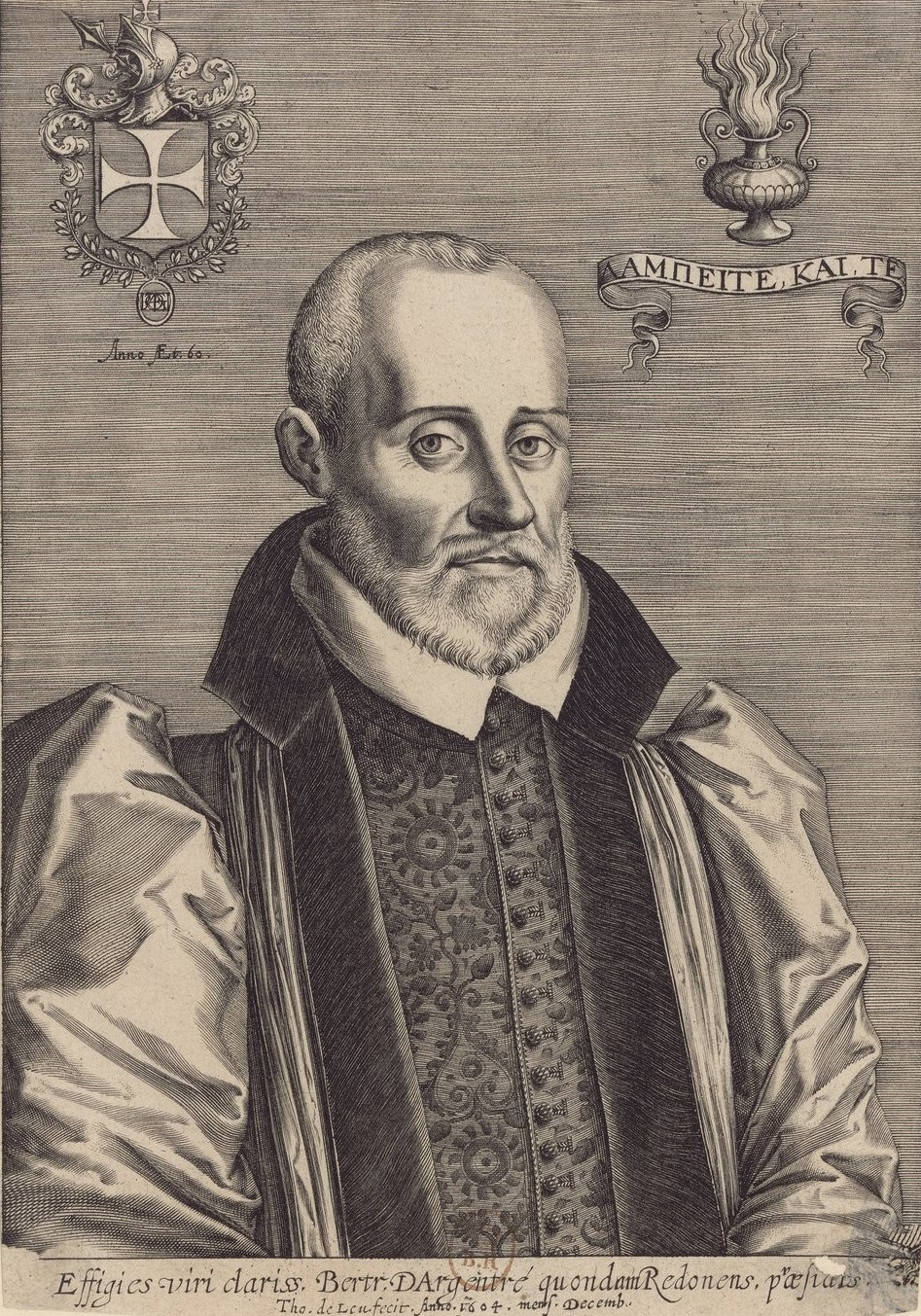 Portrait de Bertrand d'Argentré (1519-1590), estampe.